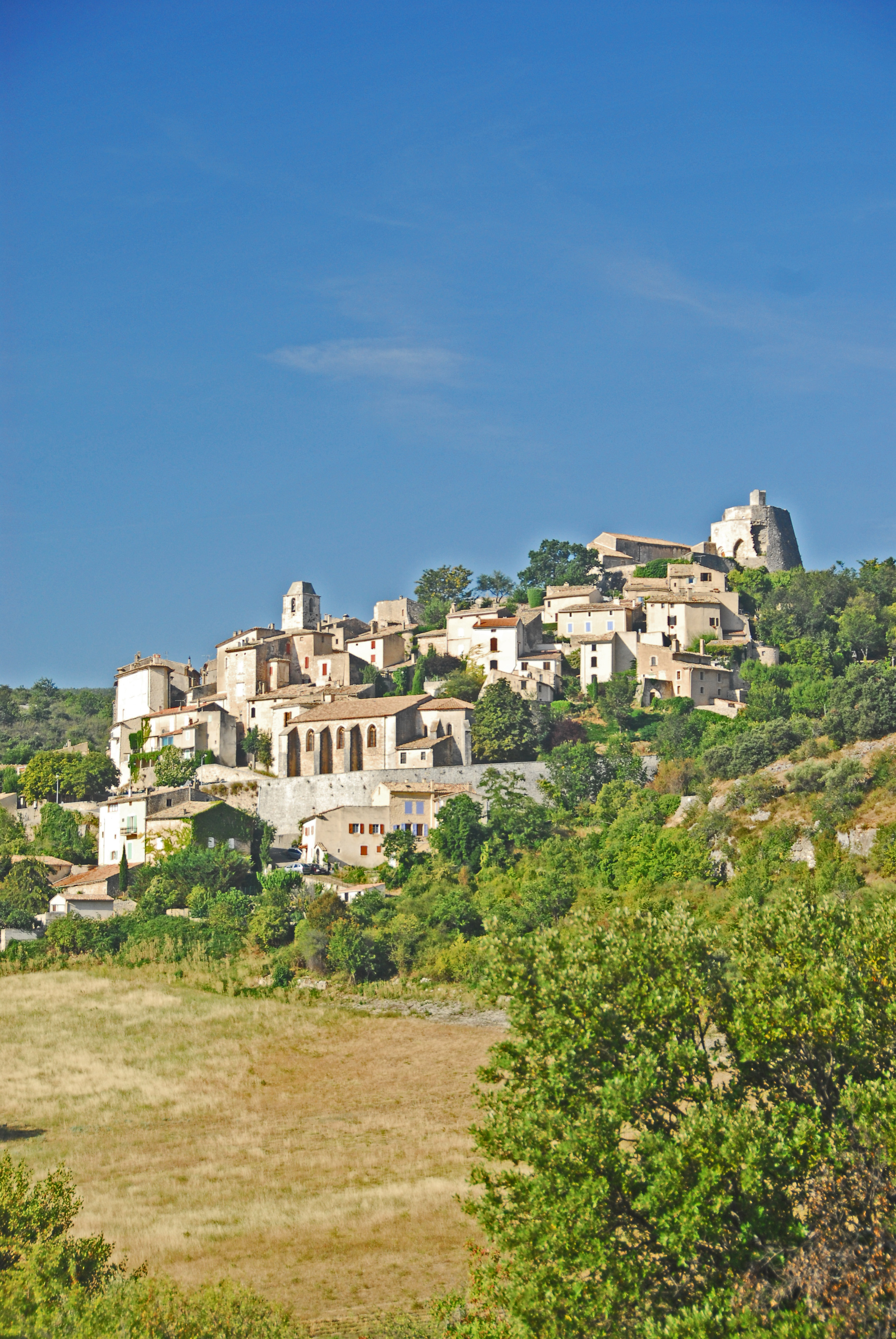 Chateau de Simiane-la-Rotonde, Ansicht des Dorfs von S